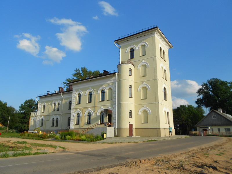 Тарнова. Сядзіба Грабоўскіх